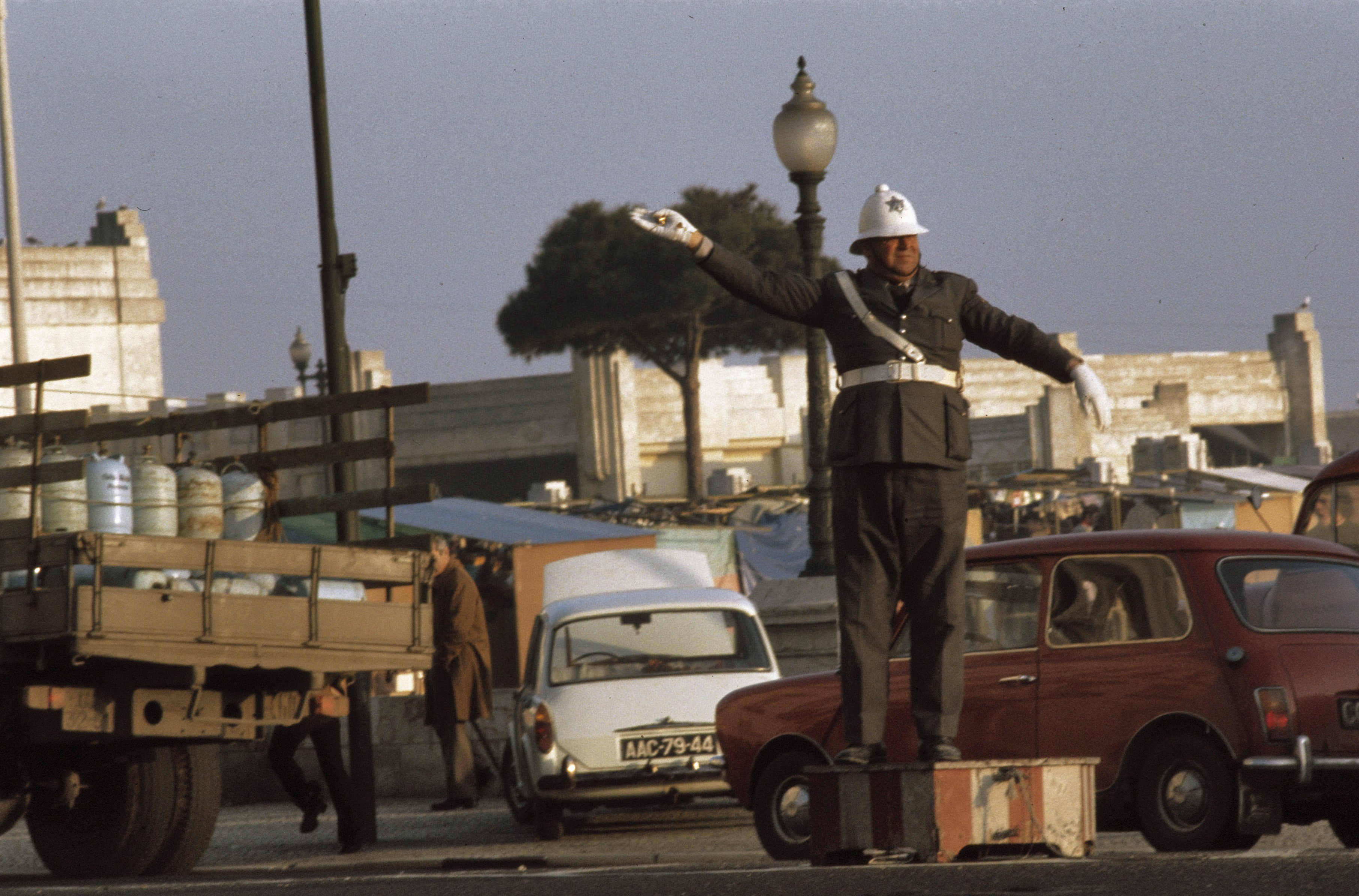 Collectie / Archief : Fotocollectie Anefo Reportage / Serie : [ onbekend ] Beschrijving : Portugal, verkiezingsstrijd/straatbeelden in Lissabon (begin 1975); straatbeelden, verkeersagent Datum : 1975 Locatie : Lissabon, Portugal Trefwoorden : politie, straatbeelden, verkeer, verkiezingen Fotograaf : Mieremet, Rob / Anefo Auteursrechthebbende : Nationaal Archief Materiaalsoort : Dia (kleur) Nummer archiefinventaris : bekijk toegang 2.24.01.06 Bestanddeelnummer : 254-9572